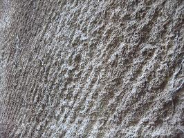 Traces laissées par l'emploi d'une escoude utilisée pour l'extraction de la pierre dans les carrières de Sussargues 34160 France